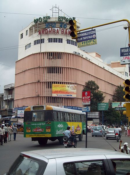 Front view of Andhra Bank main office in Kothi, Hyderabad. The building is adjacent to the busy Sultan Bazar and WOmen's college in a busy area, and has been a landmark in that area This is a picture taken & uploaded by me